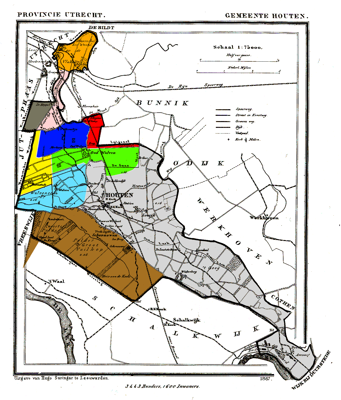 municipality of Houten, the Netherlands (1868) Highlights show "heerlijkheden" before 1795: Maarschalkerweerd (orange), Grote Koppel (pink), Kleine Koppel (dark grey), Waayen (dark blue), Slagmaat (red), Heemstede (yellow), Oud-Wulven (green), Wulven (light blue), Schonauwen (brown), Houten (light grey).